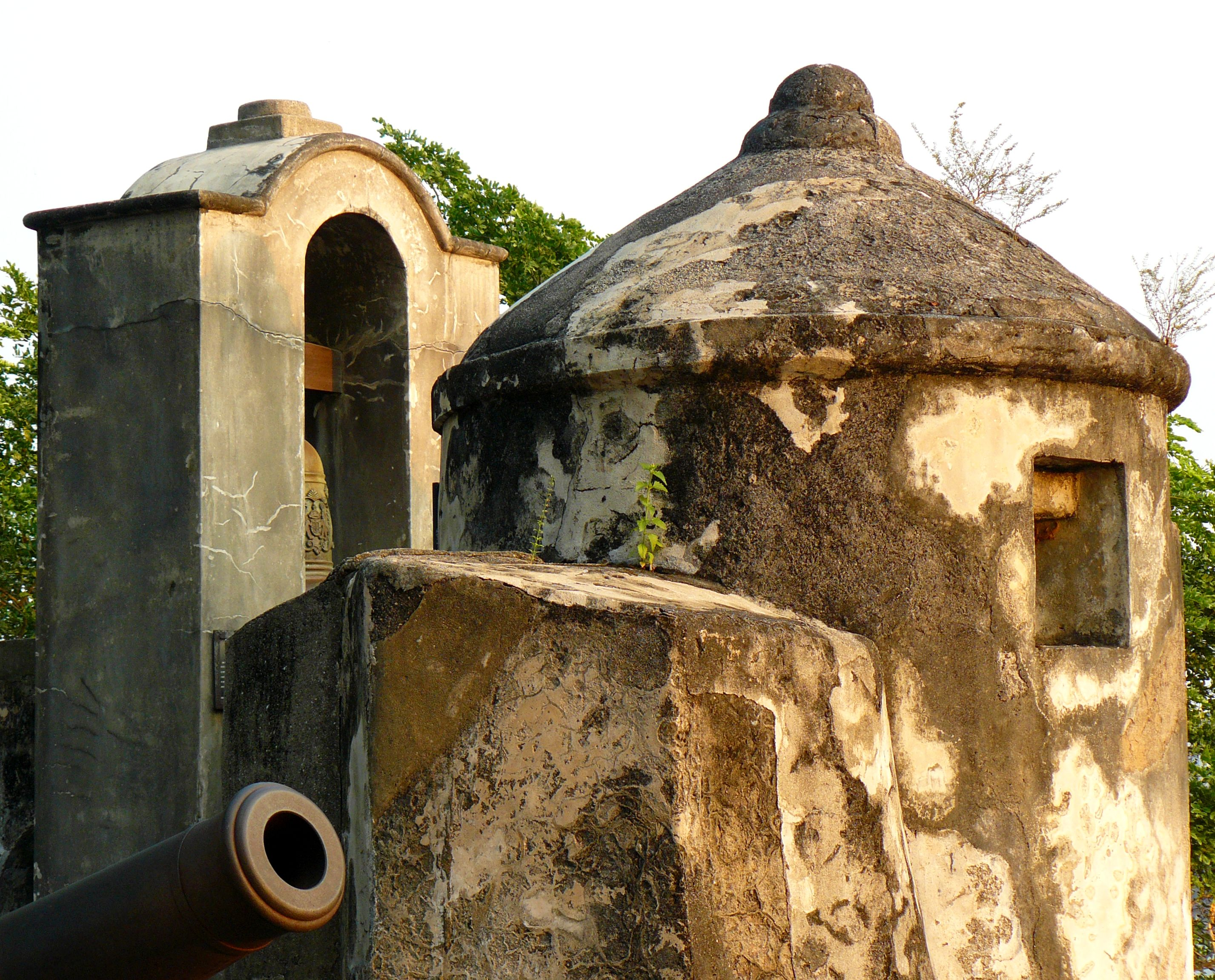 Monte Fort, Macau